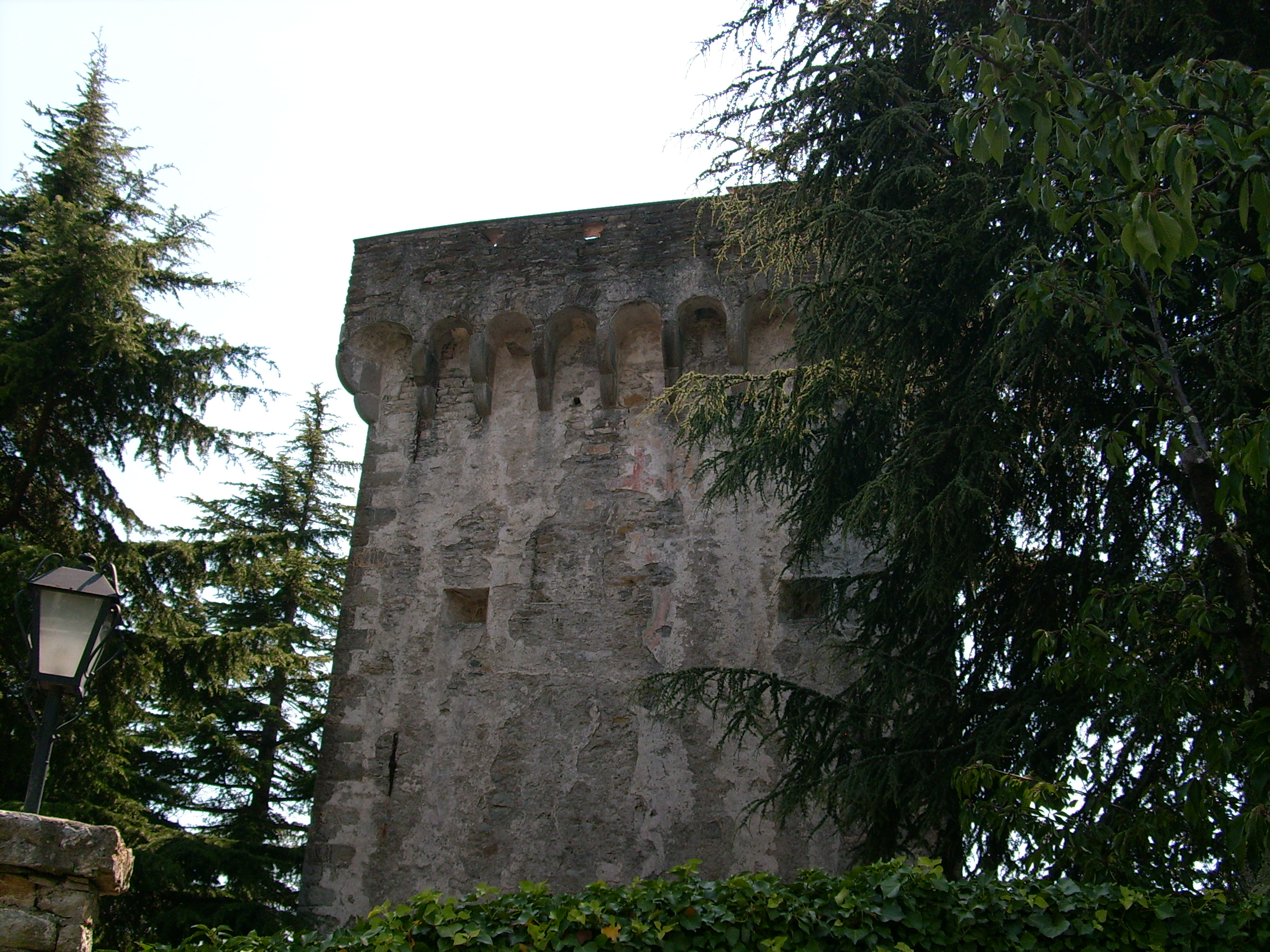 Antica torre di avvistamento presso Leivi, Liguria, Italia